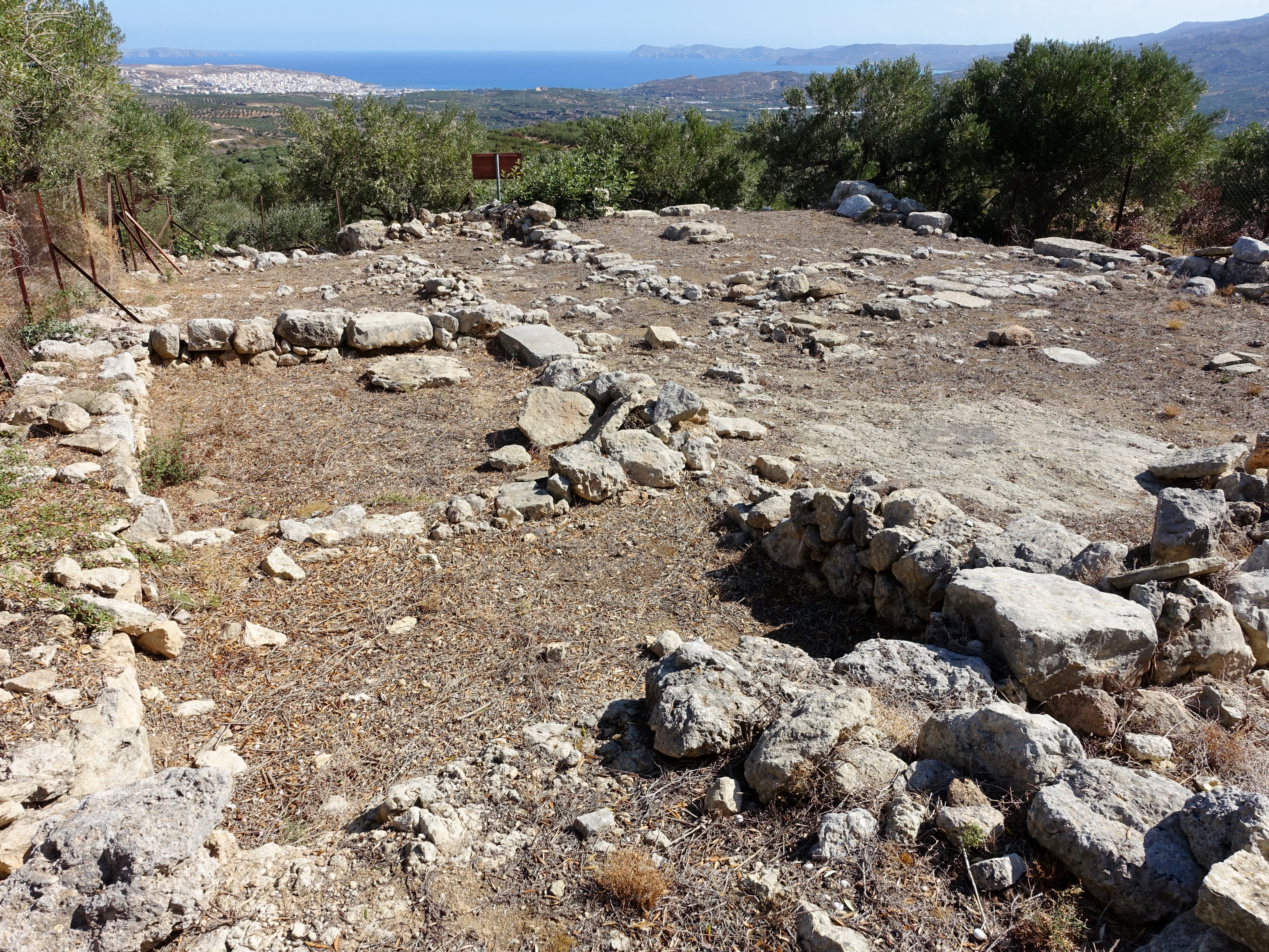 Minoische Villa von Achladia (Μινωική έπαυλη Αχλαδίων), Gemeinde Sitia, Kreta, Griechenland